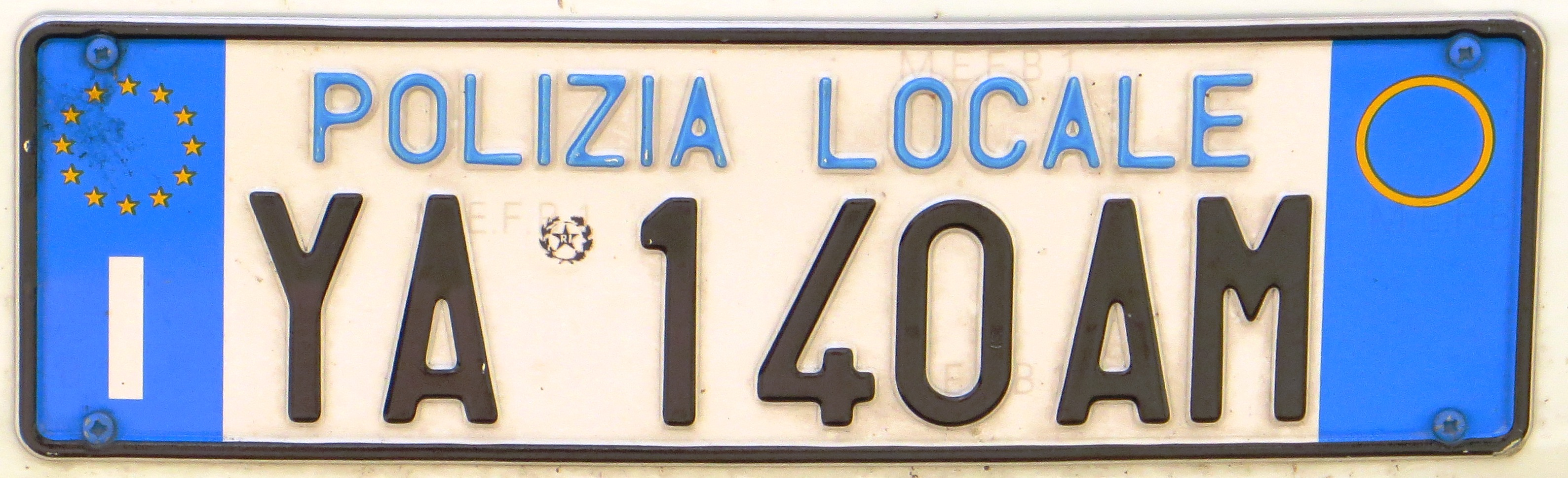 Italiaanse locale politie kentekenplaat